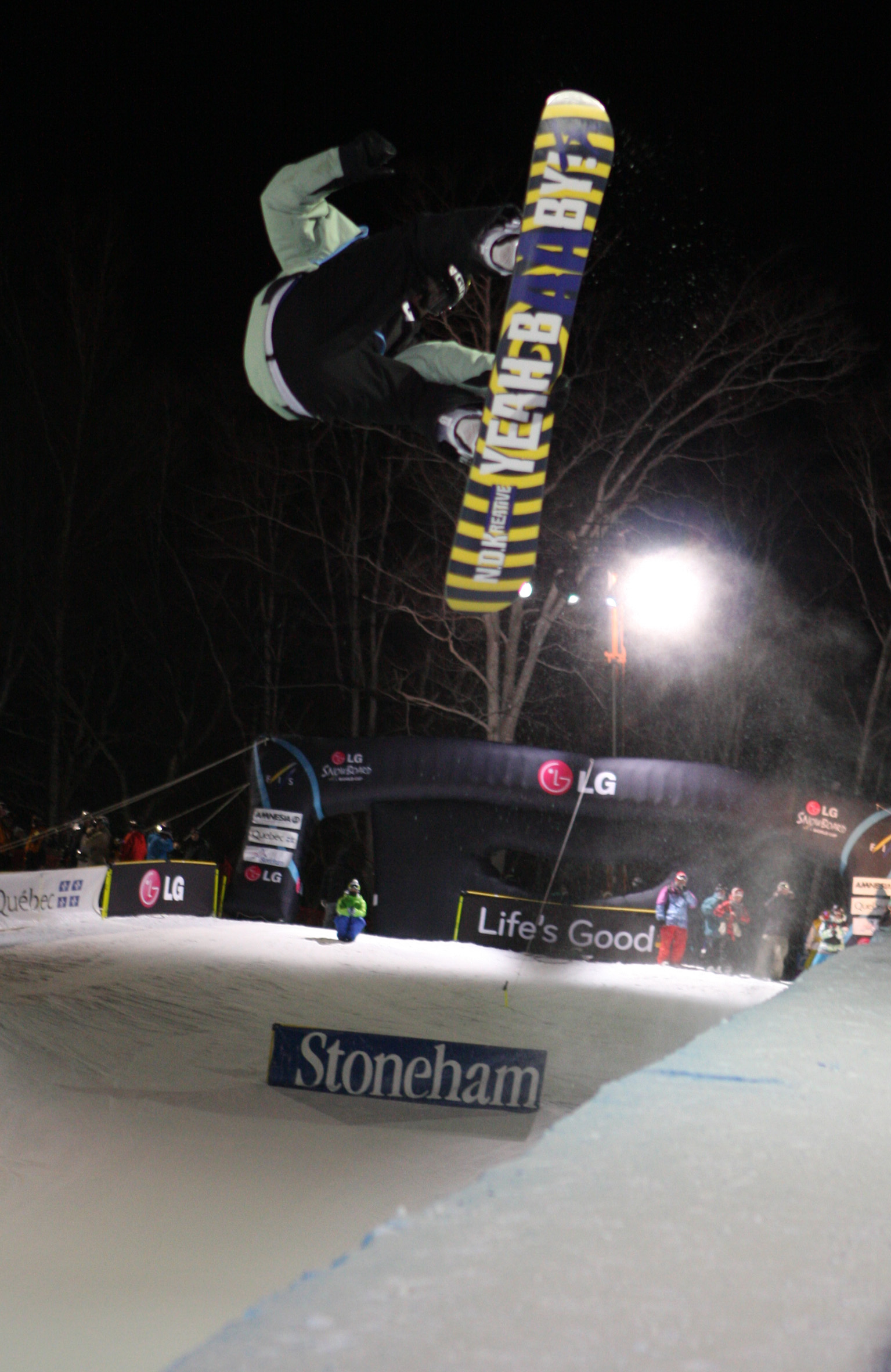 Stoneham_HP_Antti_Autti_FIN_02